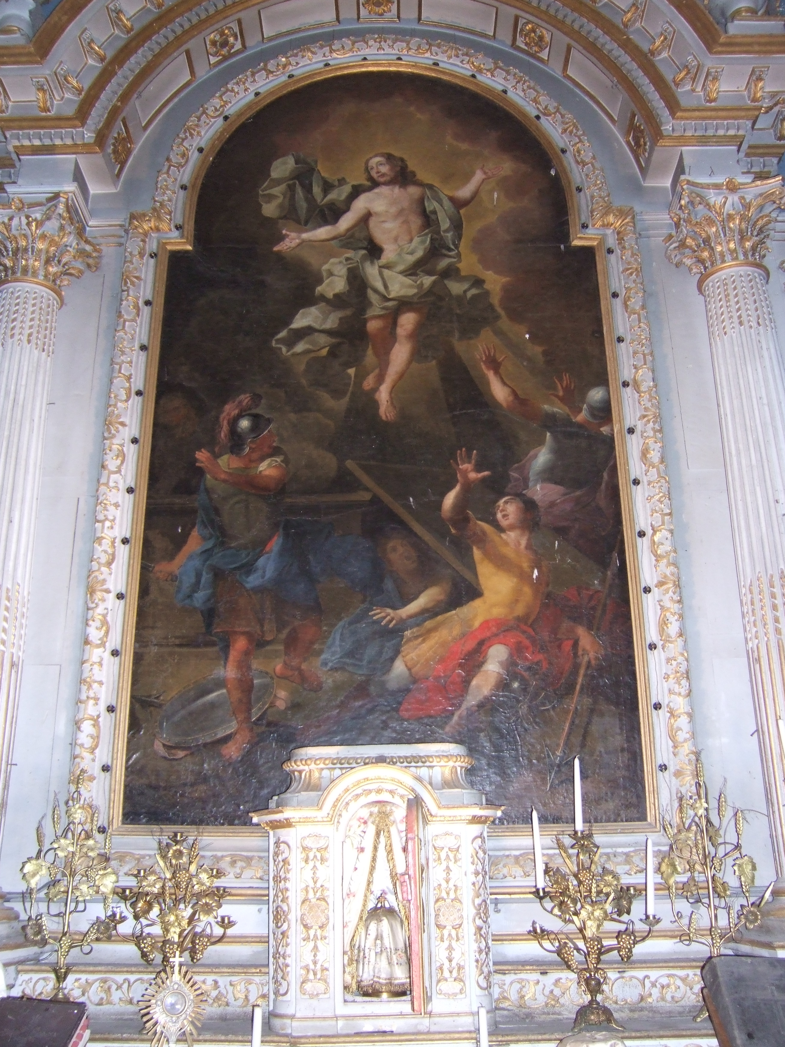 Eustache Restout, Résurrection, Choeur de l'église de Tournay-sur-Odon